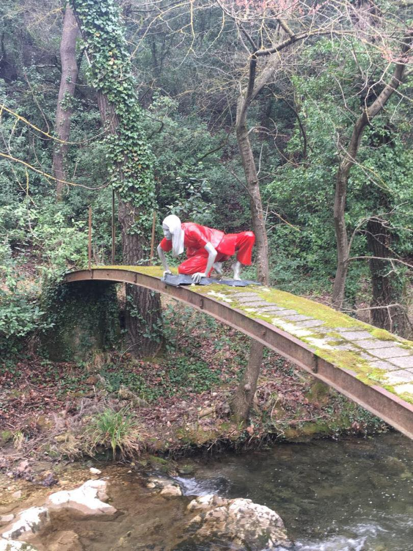 Cette fée est le résultat du travail des deux artistes Lucy et Jorge Orta. En imaginant un parcours le long du fleuve, cette œuvre contemporaine, nous invite à découvrir l’Huveaune à travers « des histoires d’esprits, de princesses, de nymphes, de gitanes et de déesses mères que charrie ce cours d’eau ». Les cinq sculptures qui représentent des personnages féminins font rêvées petits et grands. Situation : Saint-Zacharie, Auriol, Aubagne et Marseille